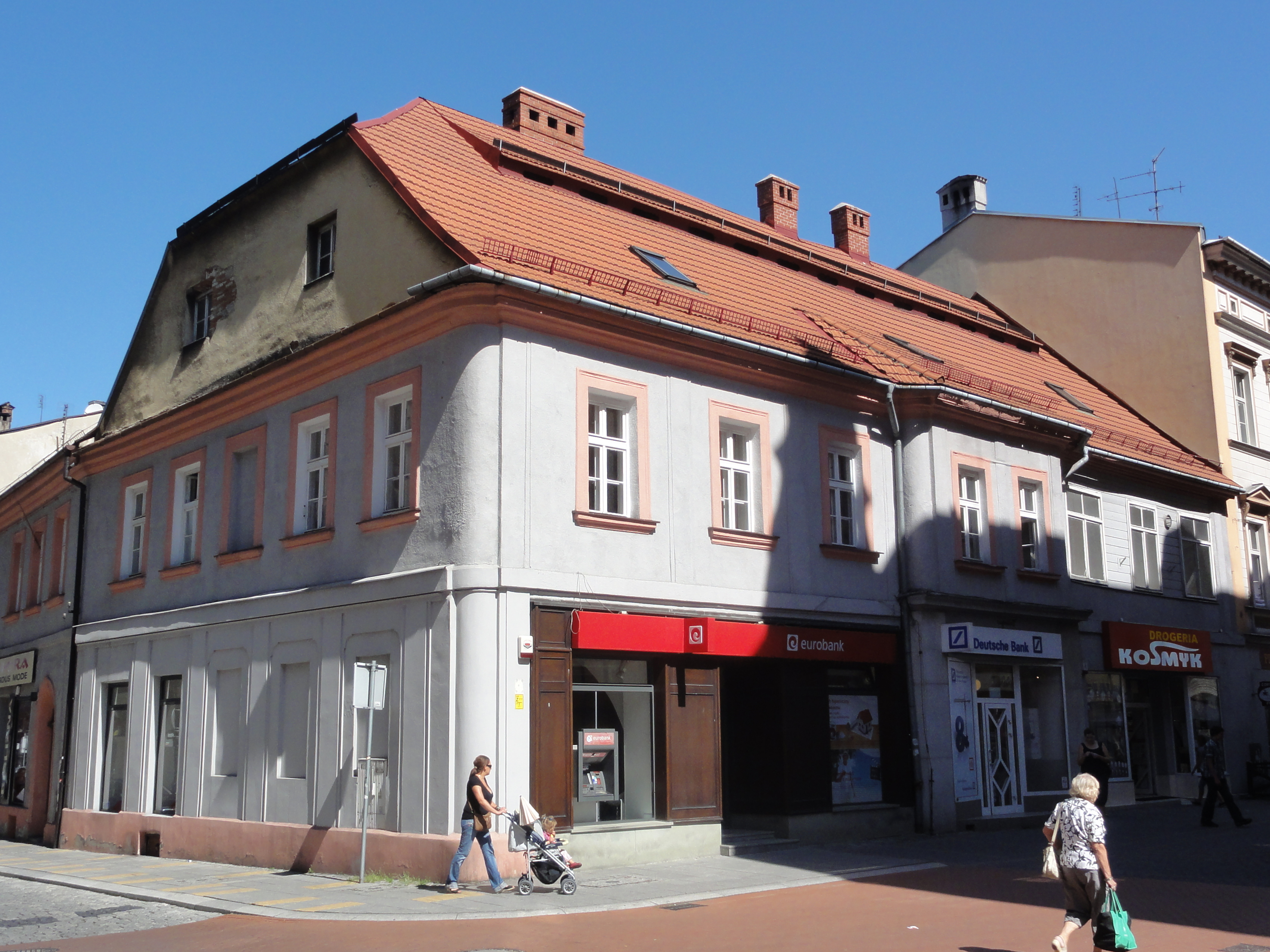 Bielsko-Biała, ul. 11 Listopada 1